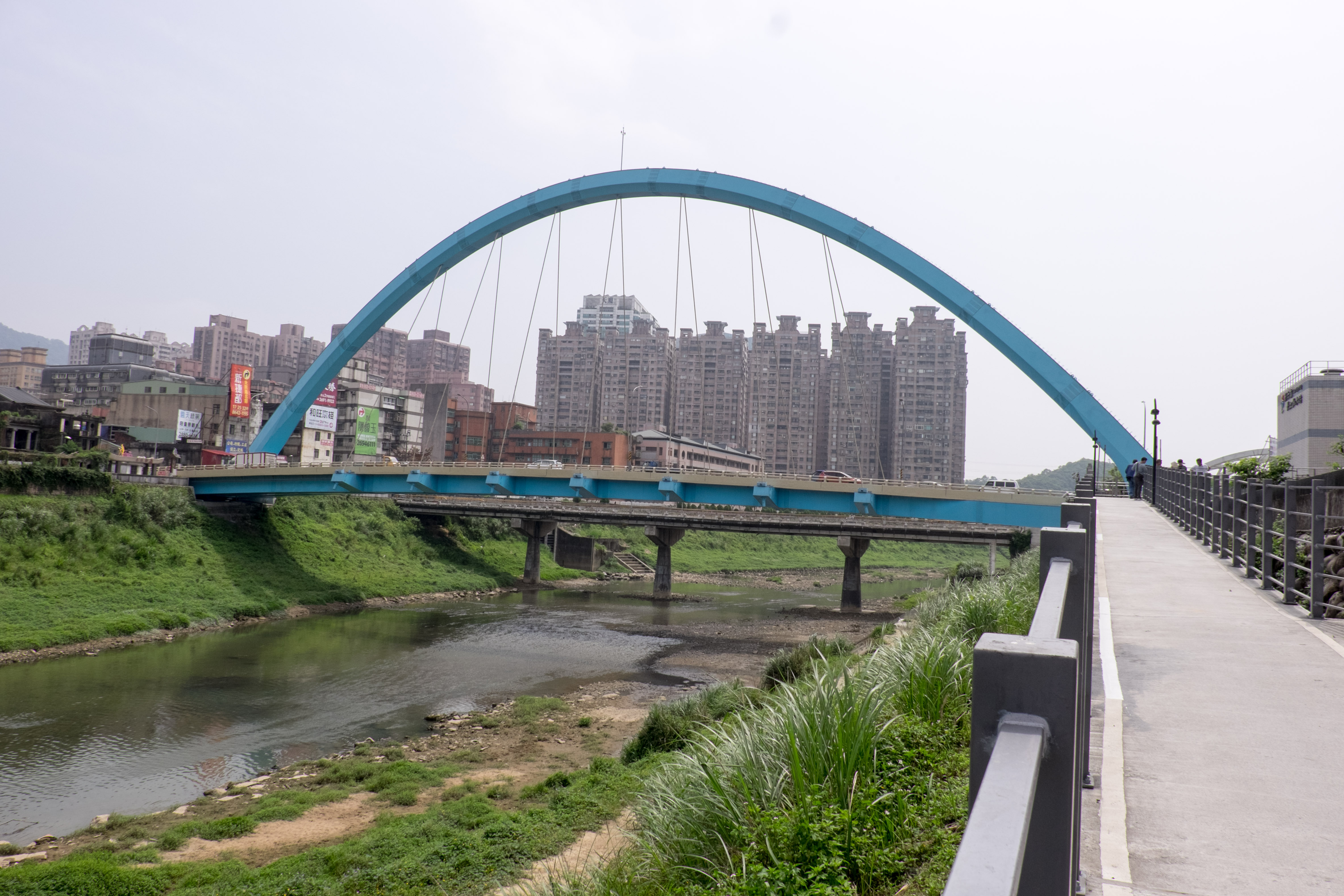 中文（台灣）: 新北市汐止區禮門街中山高速公路汐止交流道聯絡橋東側，攝於基隆河北岸自行車道。